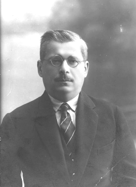 Antoni Łokuciewski